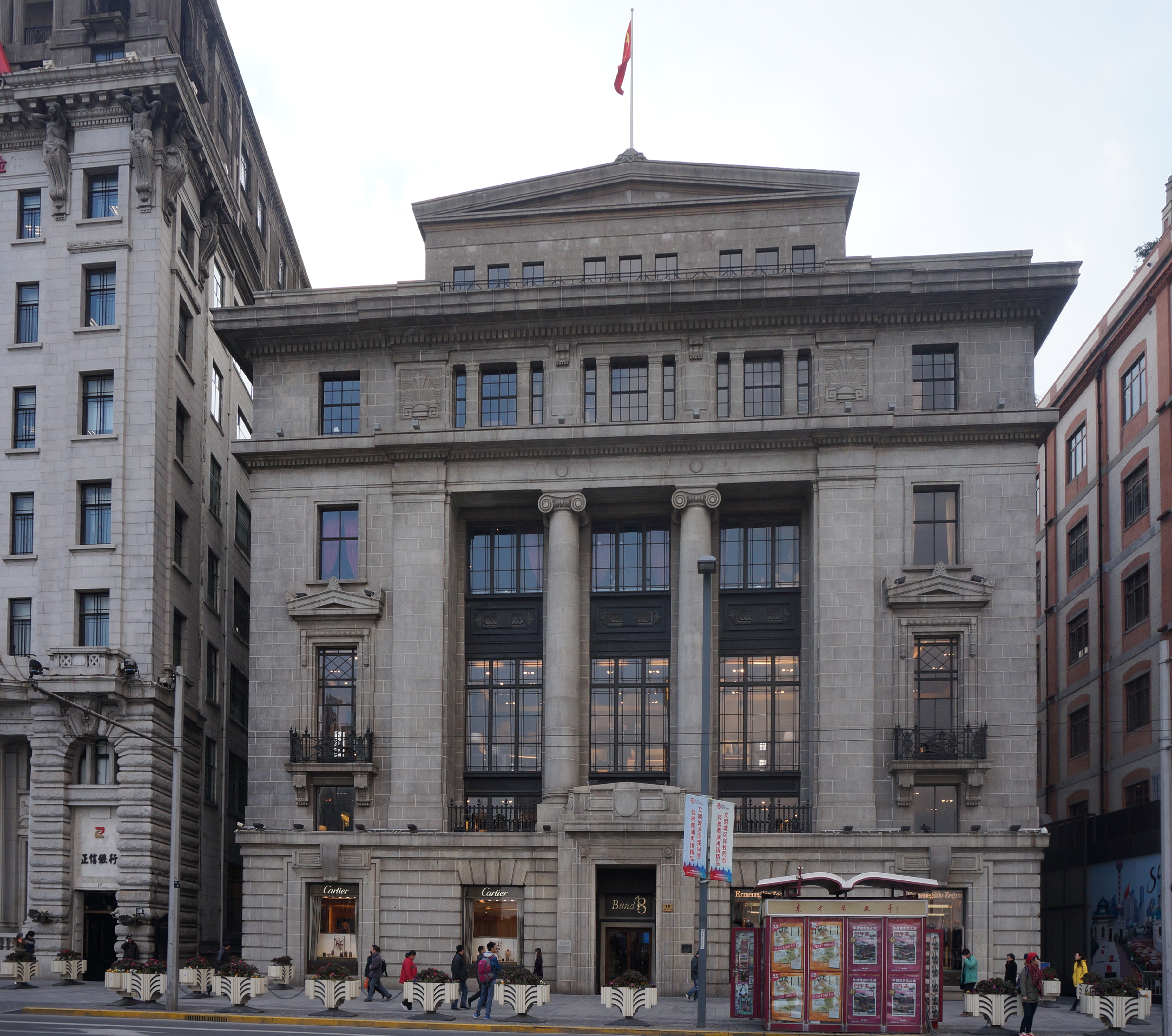 外滩麦加利银行大楼